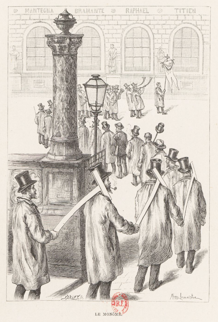 Dessin d'Alexis Lemaistre pour son livre "L'École des beaux-arts dessinée et racontée par un élève". Il représente ici en 1889 le traditionnel monôme de sortie de loges des élèves architectes.